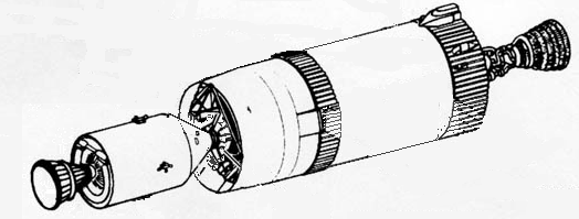 Representación del proyecto Apollo-Venus empleando como base la imagen en dominio público Image:Wet Workshop.jpg. El modelo a representar se encuentra en Image:MockupOfPhaseAApolloToVenusTest.jpg, Image:VenusFlybyStudyMissionPhases.jpg y Image:VenusFlybyCutaway.jpg, presentes en Manned Venus Flyby. Realizada para ilustrar el artículo Encuentro Tripulado con Venus.